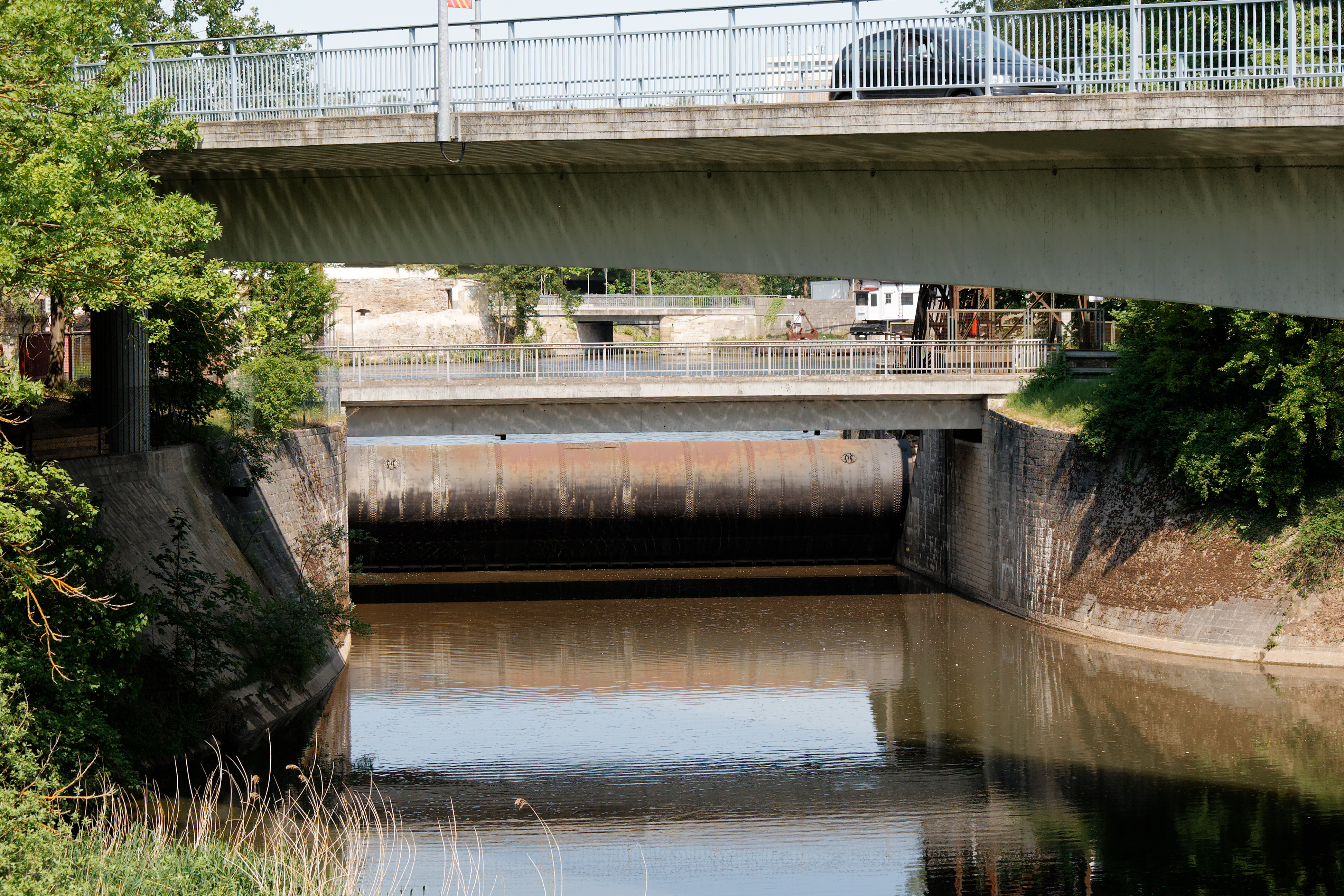 Walzenwehr am Grundablass des Mains bei Schweinfurt, erbaut 1902: Blick unter der Ludwigsbrücke zum Wehr.